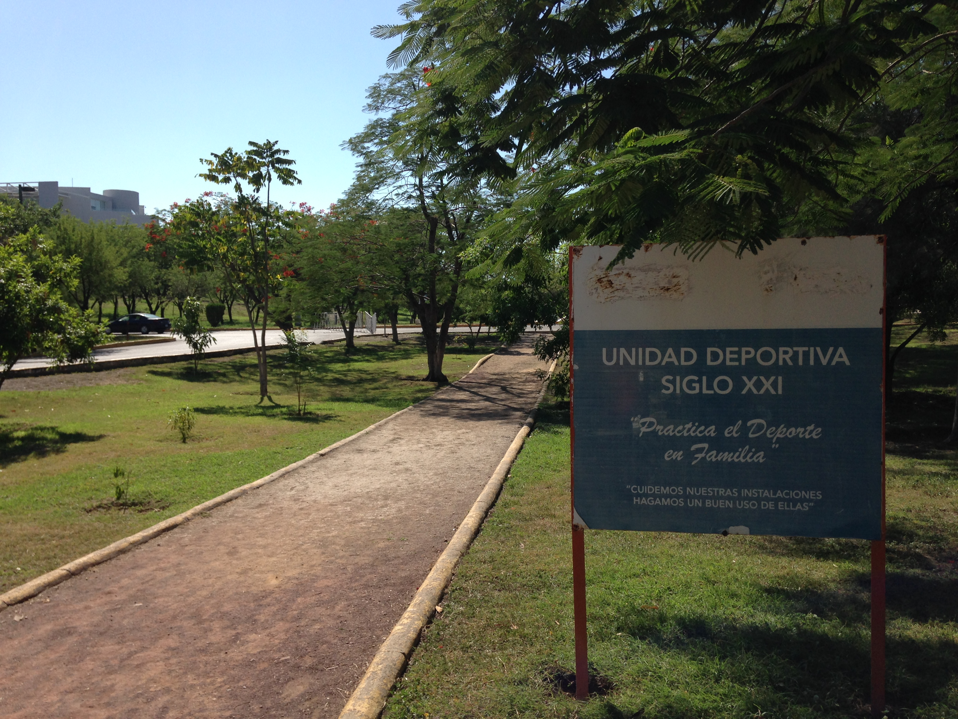 Cartel en la Unidad Deportiva Siglo XXI, Ciudad Victoria, estado de Tamaulipas, Mexico Sign of welcome to the Sporting Unit Siglo XXI in Victoria City, state of Tamaulipas